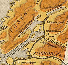 Hell-Sunnanbanen på kart fra 1914.